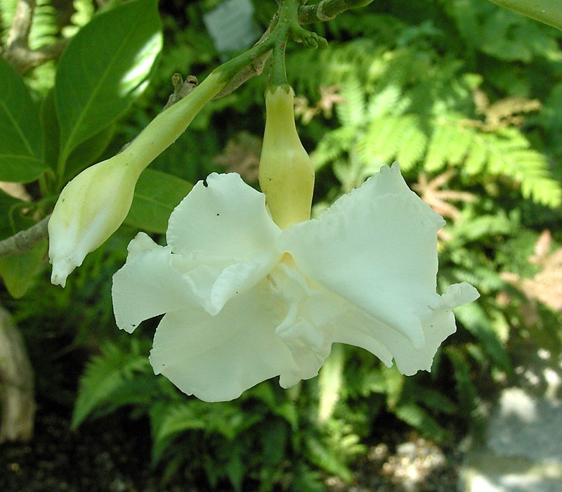 Tabernaemontana divaricata